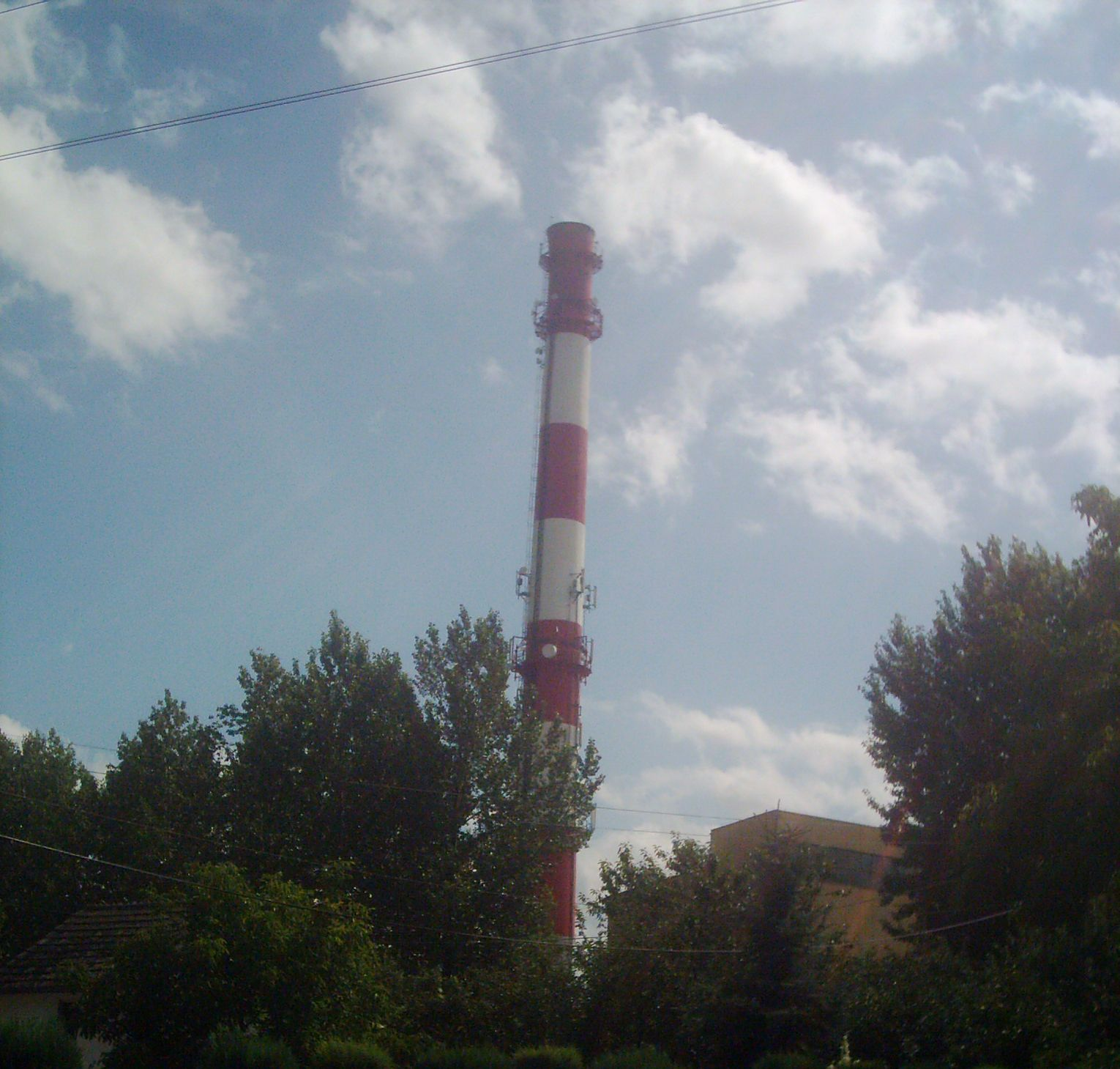 Komin Elektrociepłowni w Wodzisławiu Śląskim